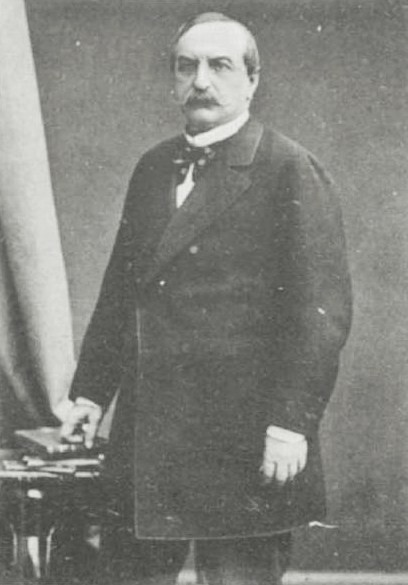 Владимир Александрович Давыдов (1816—1886)